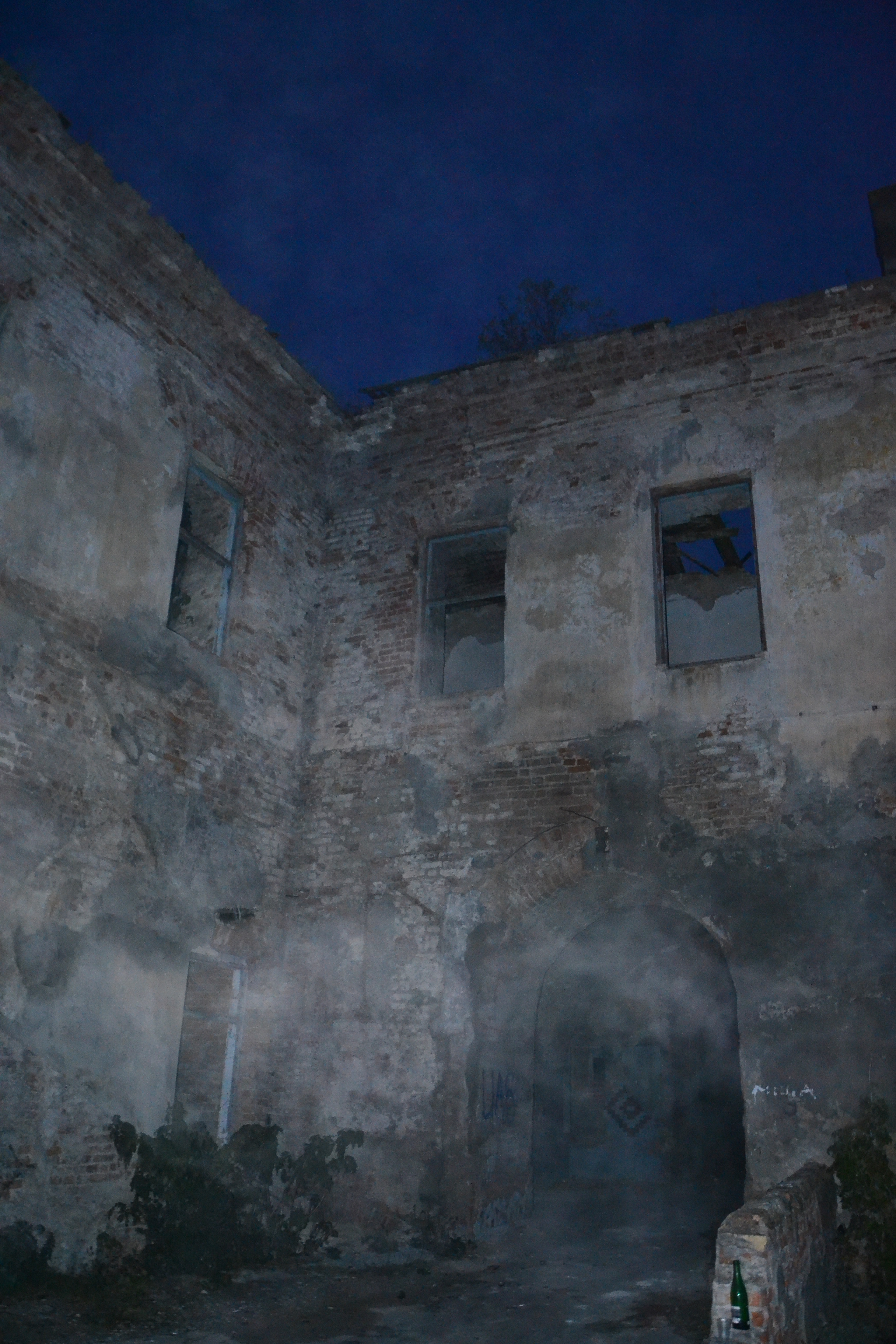 Стіна Замку (мур.), смт.Клевань